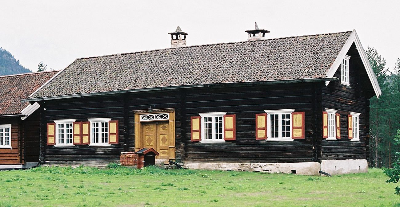 Høymyr Søre, Flesberg. Bygd før 1850. Freda 1941.